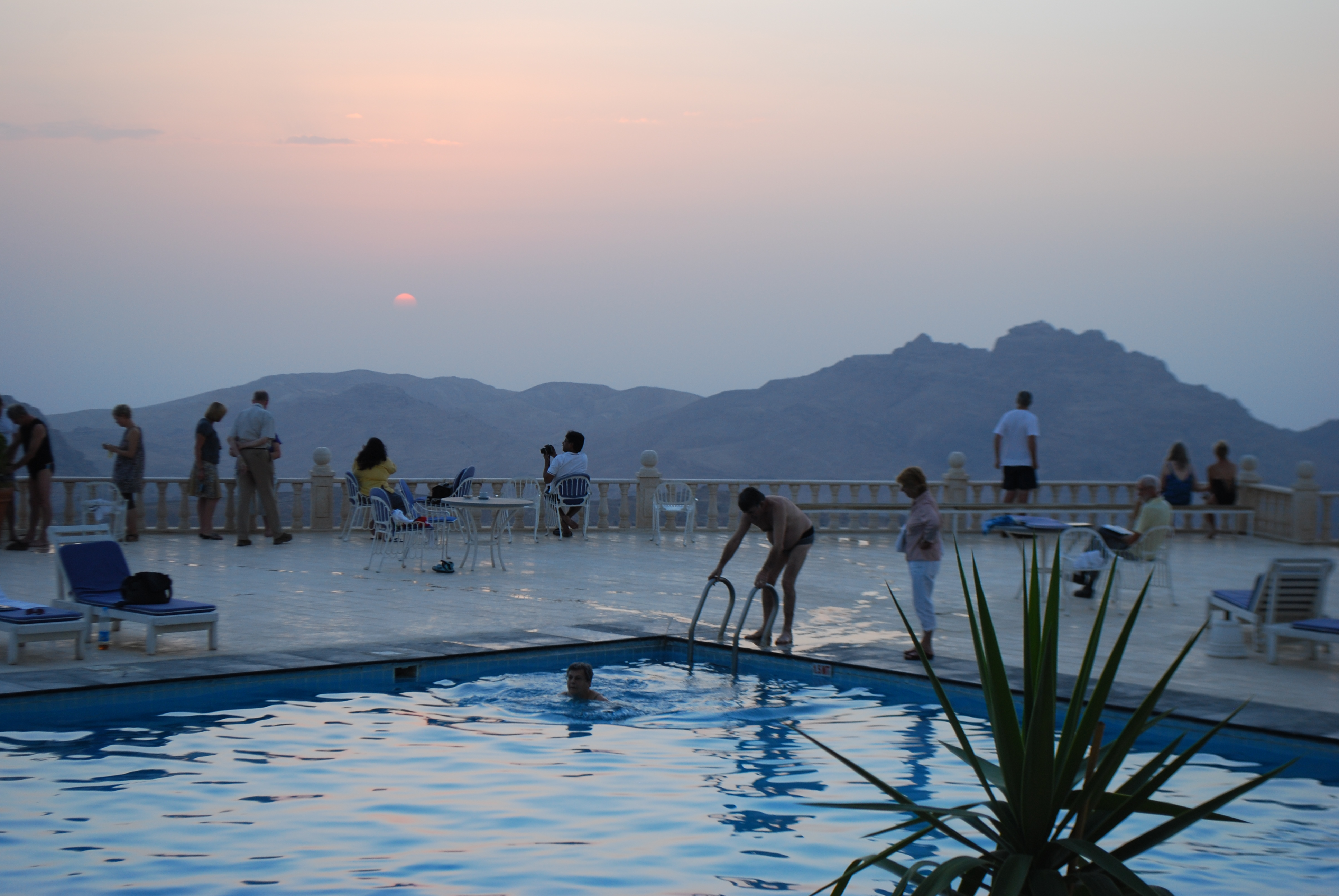 La piscine de l'hôtel Grand View à Wadi Musa : coucher de soleil sur le site de Petra.